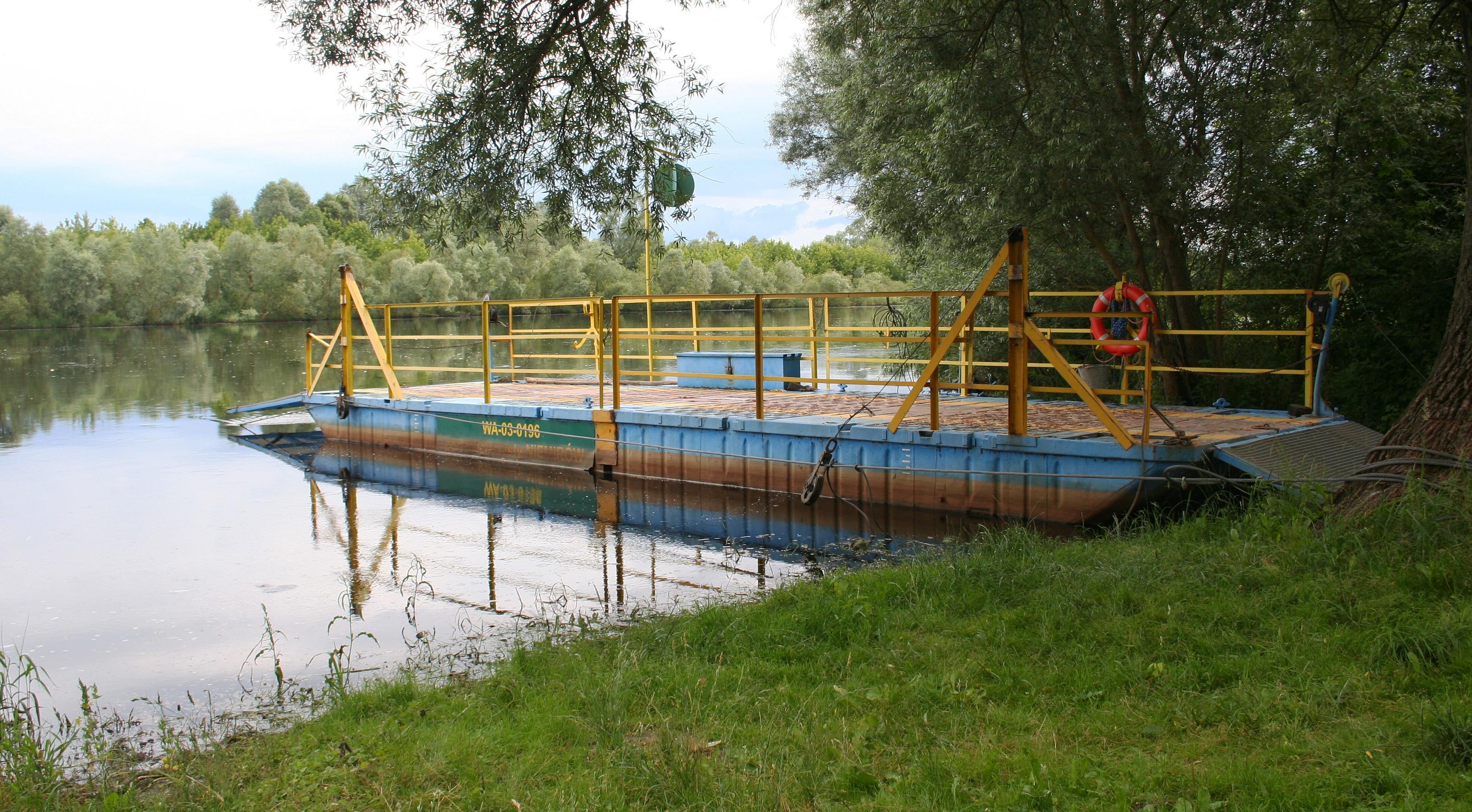 Niemirów (gmina Mielnik, pow. siemiatycki, woj. podlaskie, Polska). Prom na Bugu.